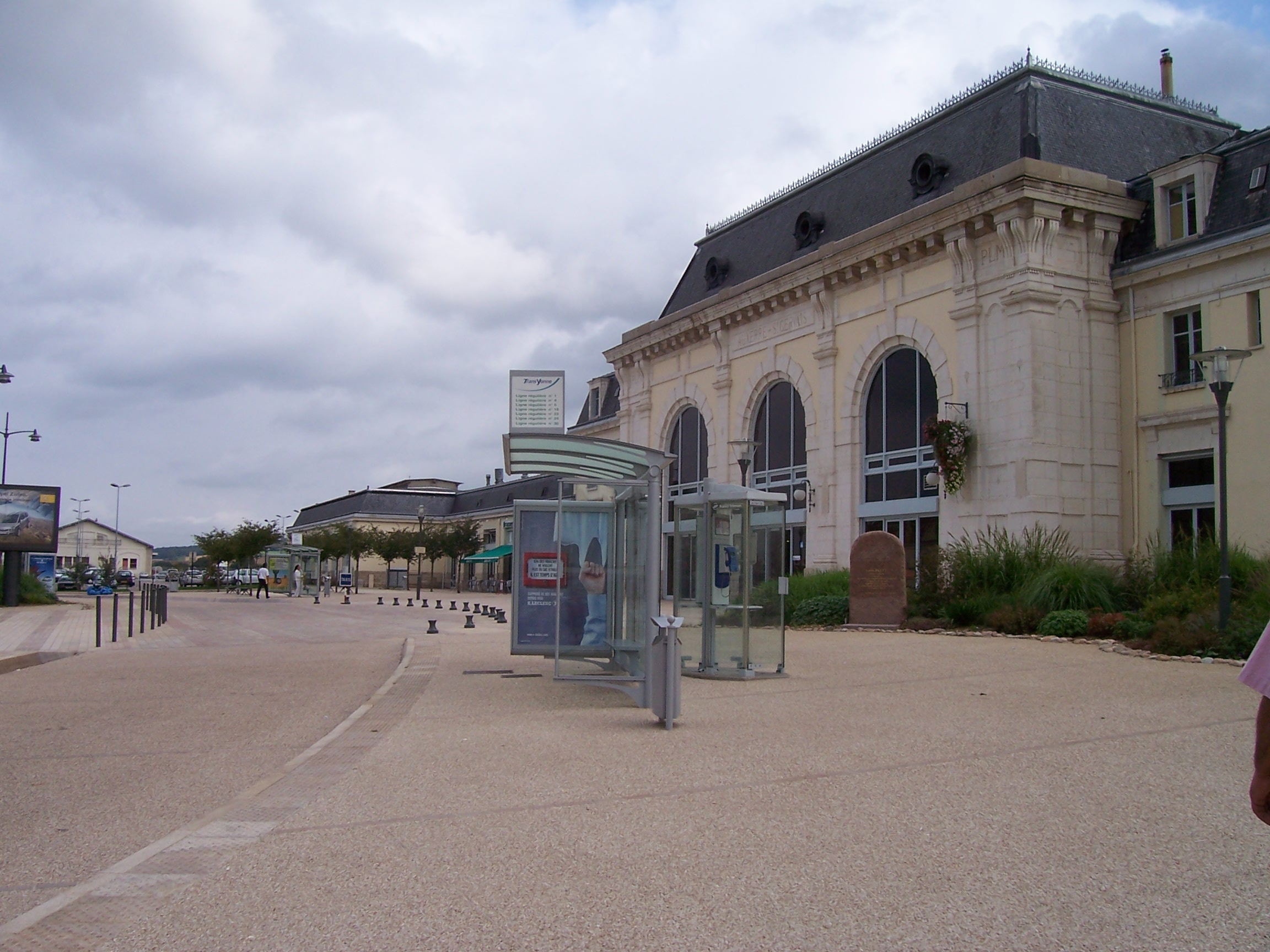 Gare d'Auxerre-Saint-Gervais